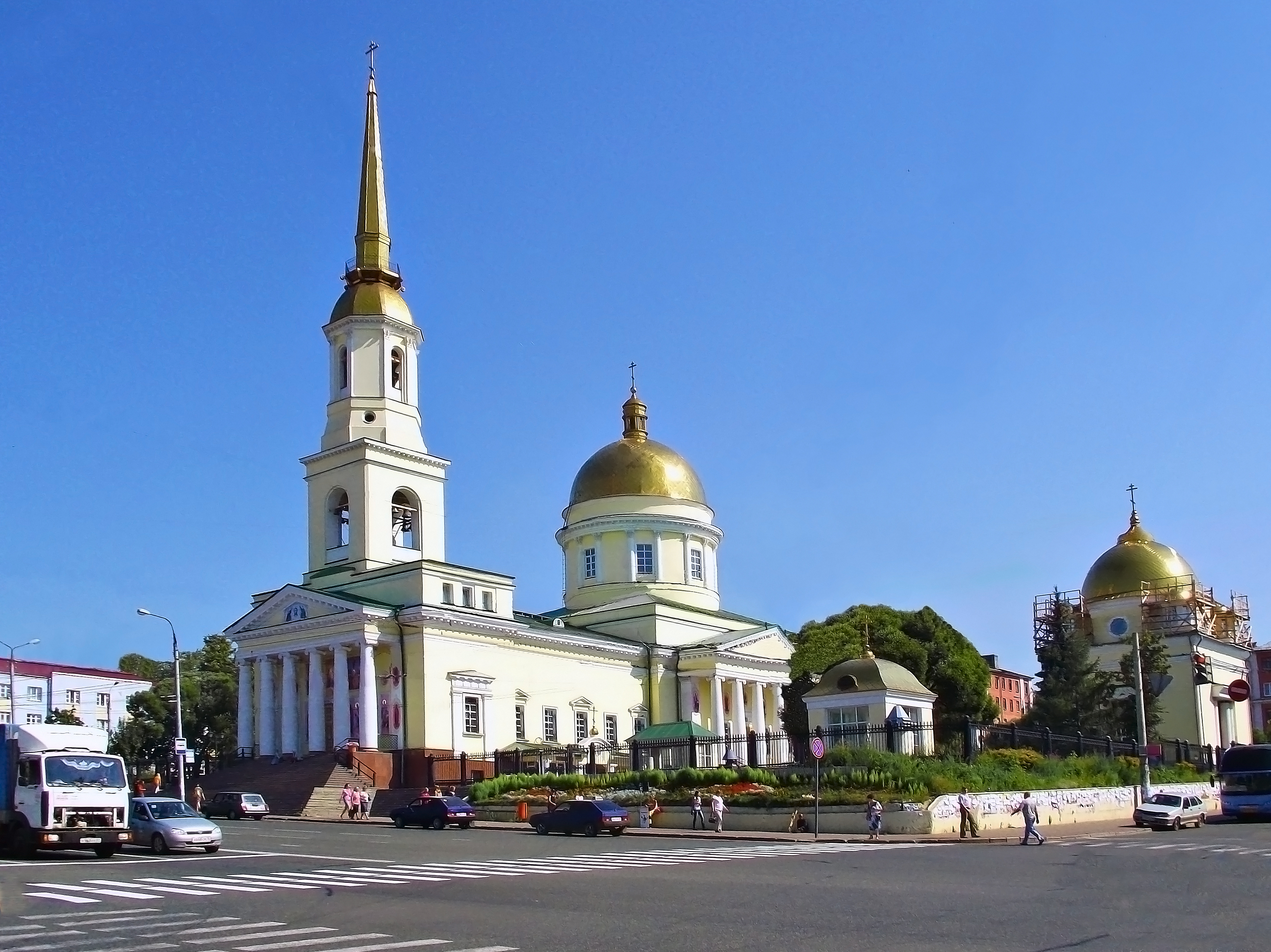 Храм построен в 1823 году по образцу Андреевского собора в Кронштадте(автор проекта — знаменитый архитектор Андреян Захаров).Изначально планировался, как центральный храм Ижевского завода.В 1930-е годы храм был разграблен и закрыт,позднее в нём работал кинотеатр «Колосс».В 1990 году при активном участии епископа Палладия возвращен верующим.